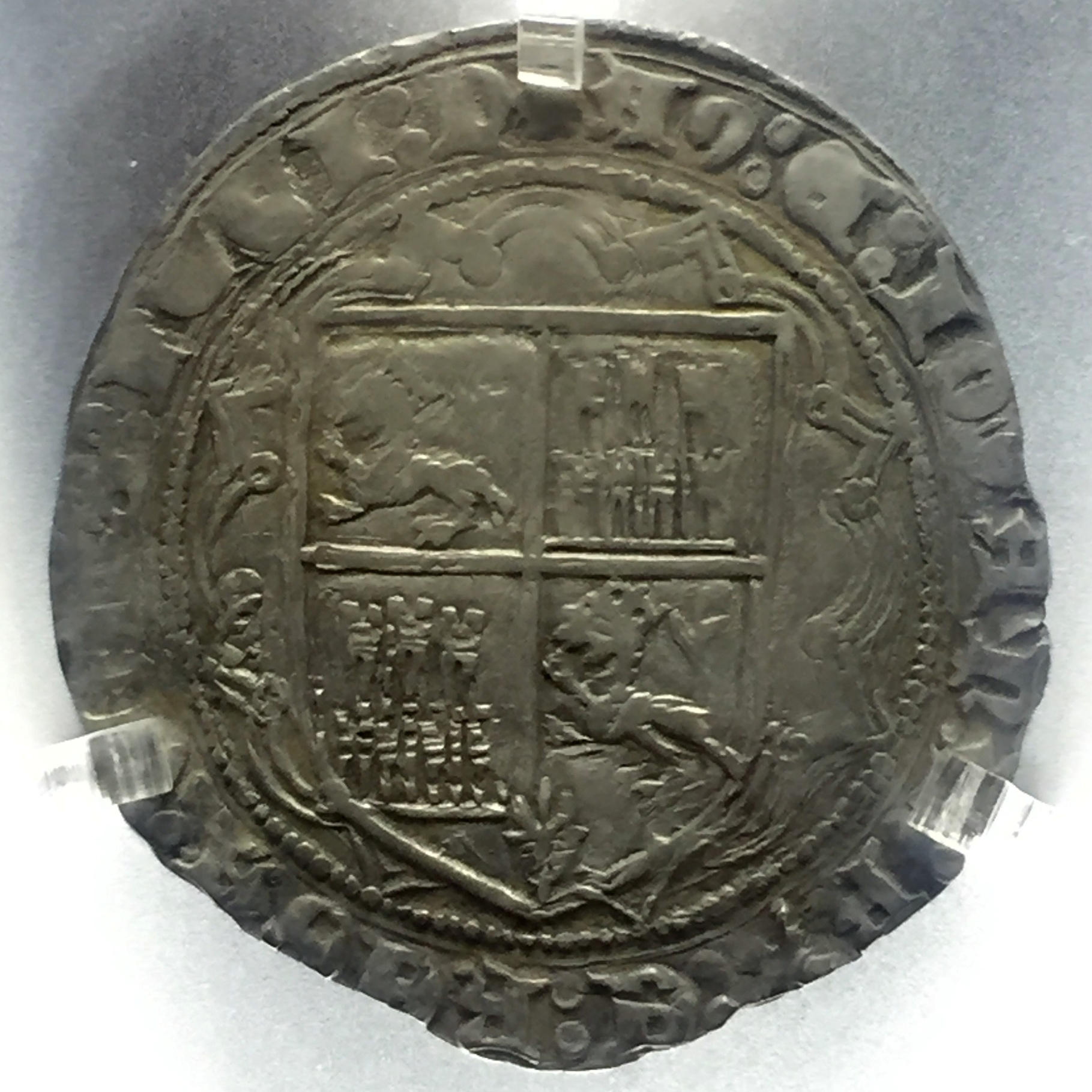 Real de plata acuñado en Toro (Castilla) en 1475 ó 1476 por Alfonso V de Portugal. En estos momentos se desarrollaba la Guerra de Sucesión Castellana entre Alfonso V e Isabel I de Castilla, con ambos monarcas titulándose reyes de Castilla, de León y de Portugal. Colección del Museo do Dinheiro de Lisboa.